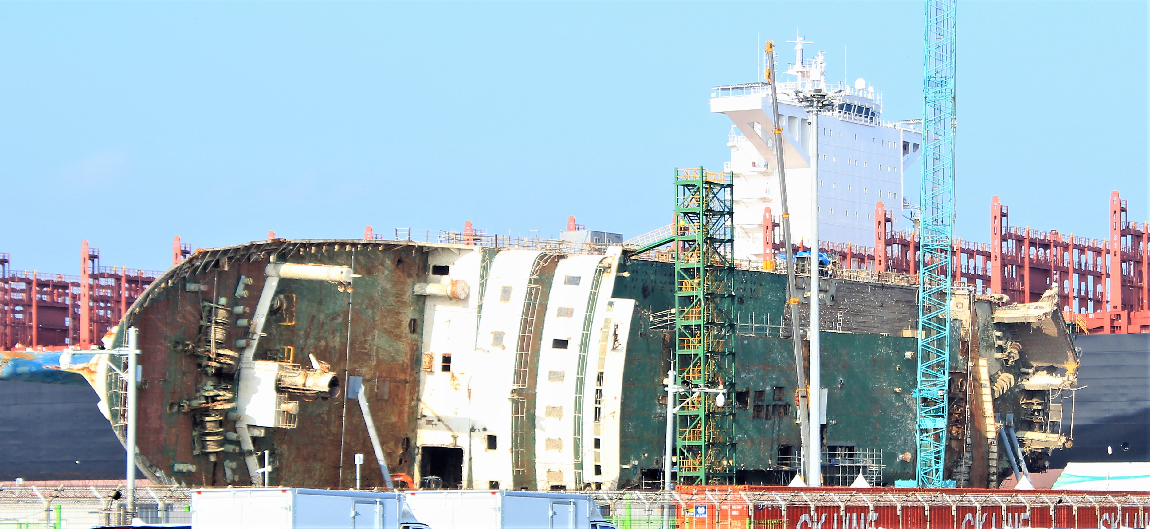 선체를 직립하기 이전의 사진입니다.